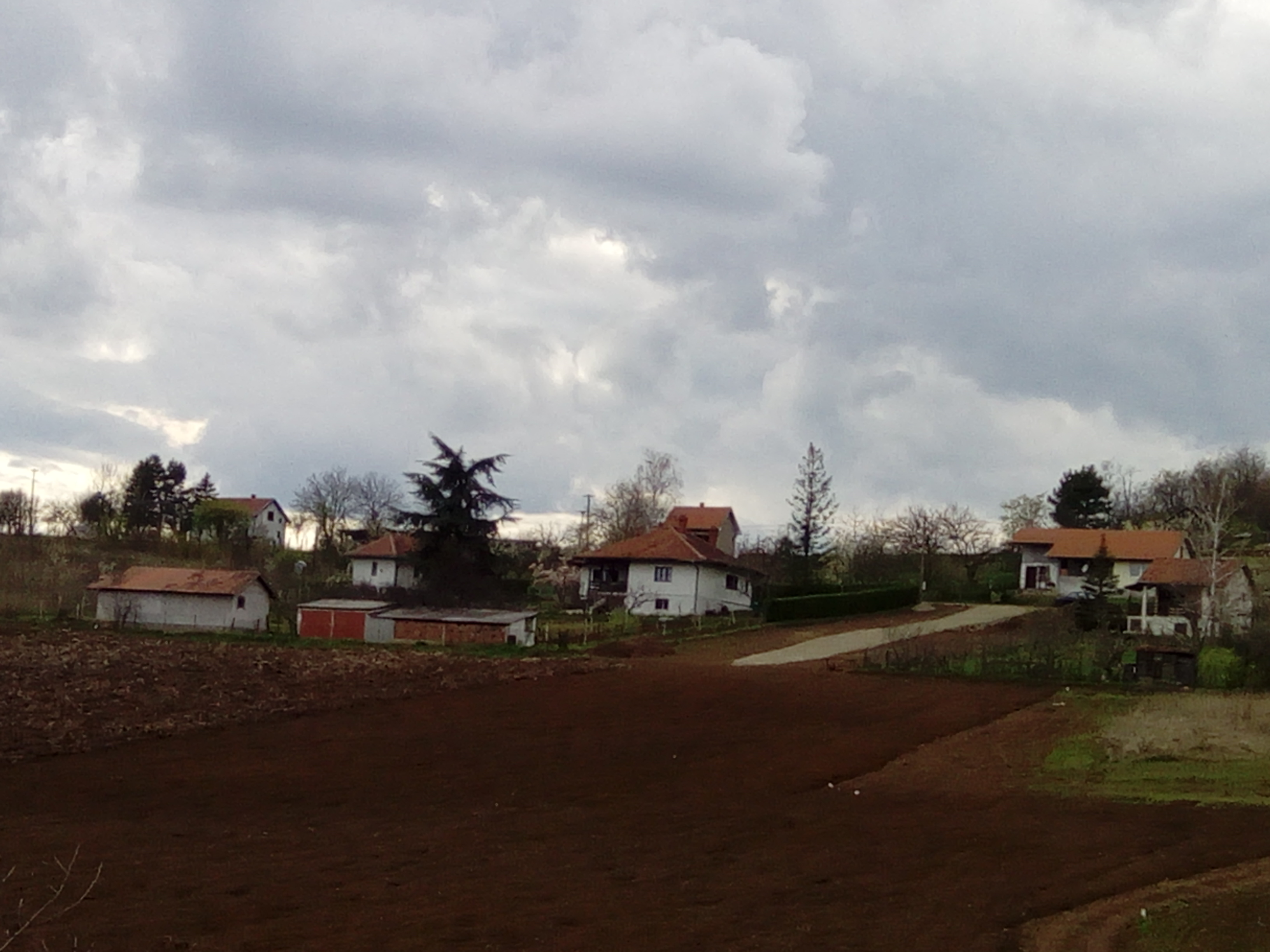 Srpski (latinica): Pogled na selo Nikšić